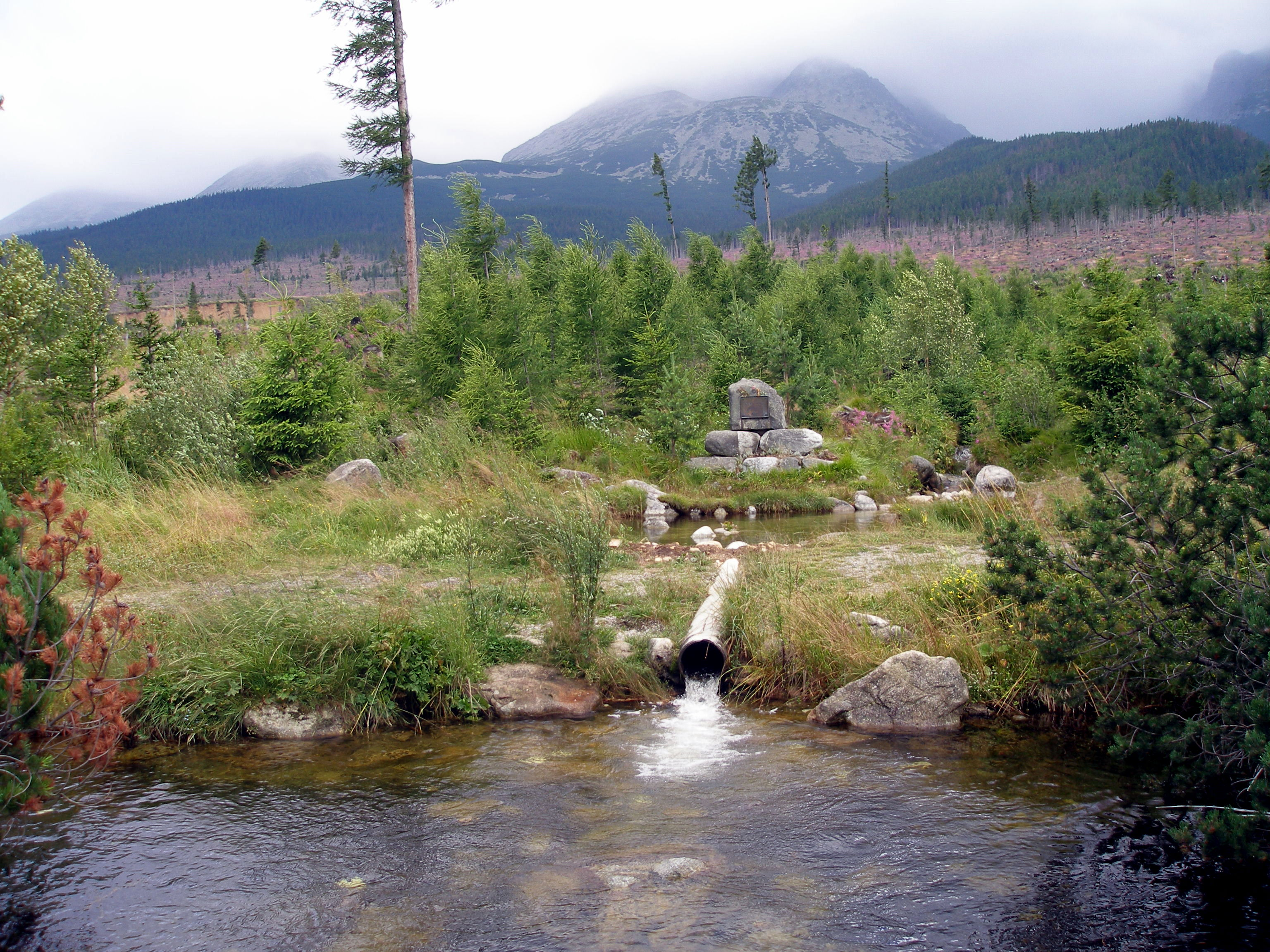 Tatranská Polianka osada vo Vysokých Tatrách